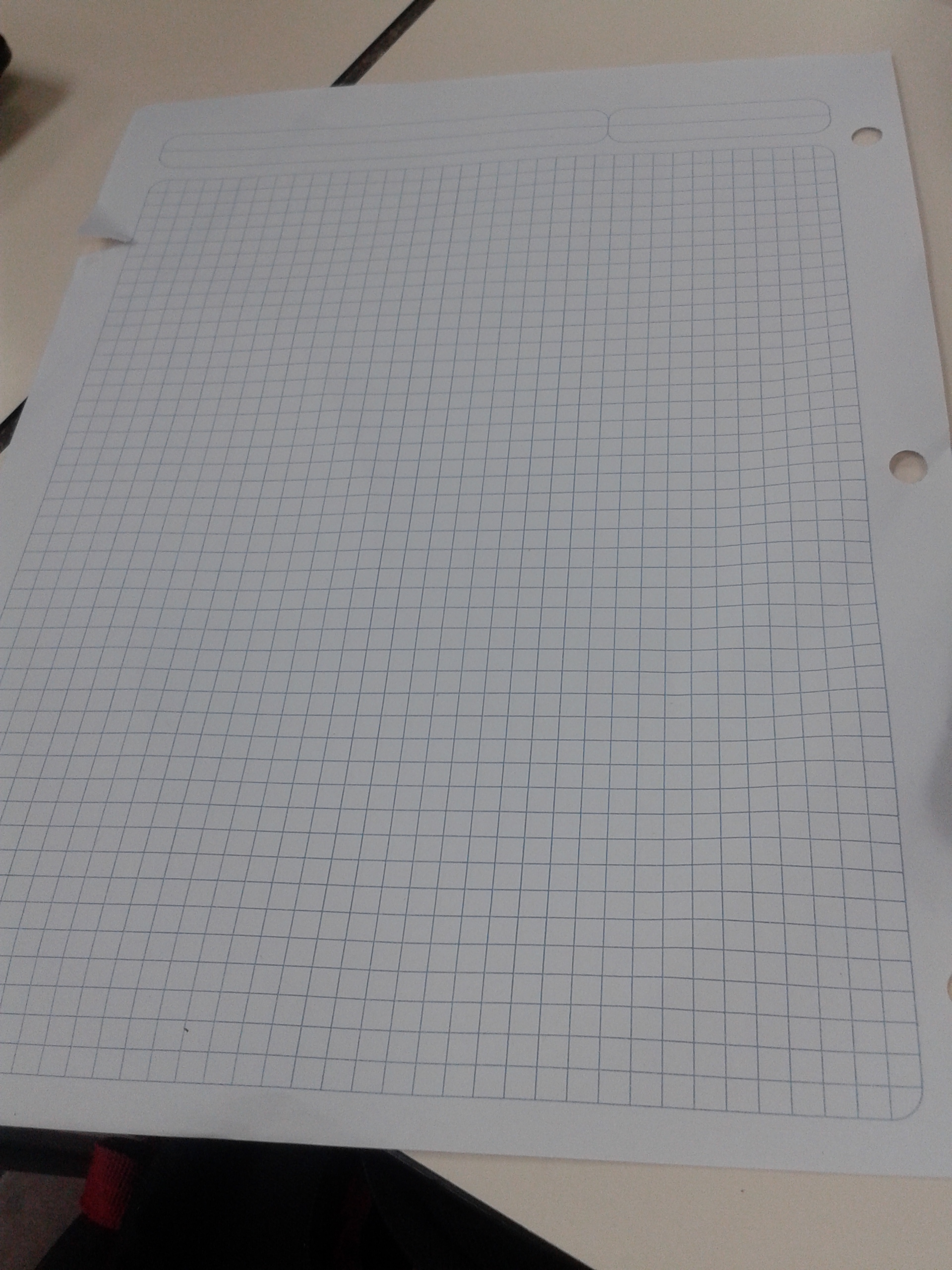 Es una Hoja de cuaderno cuadriculada